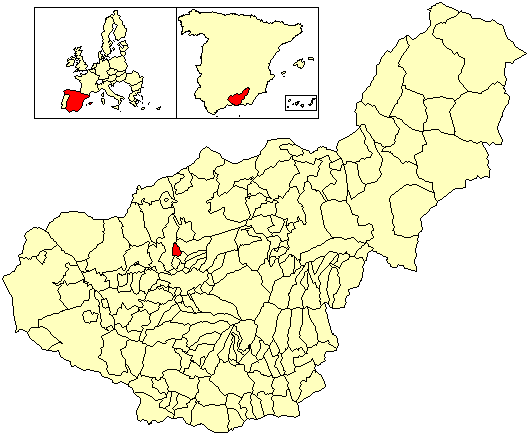 Situación del término municipal de Calicasas respecto a la provincia de Granada, en España.